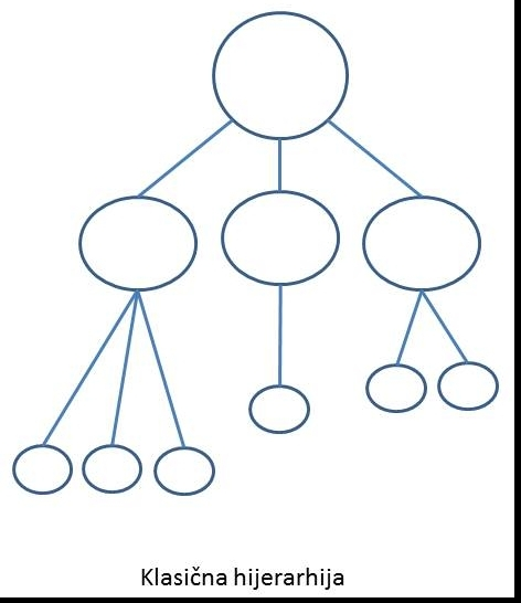 Klasični model hijerarhijskog odlučivanja